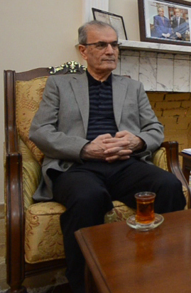 Dr. Najmaldin Karim in seinem Büro